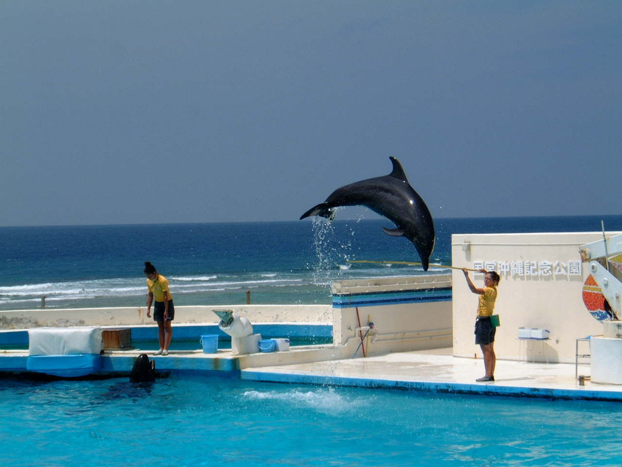 ジャンプをするイルカ。オキちゃん劇場にて撮影。